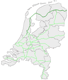 E22 in Nederland, zelf gemaakt